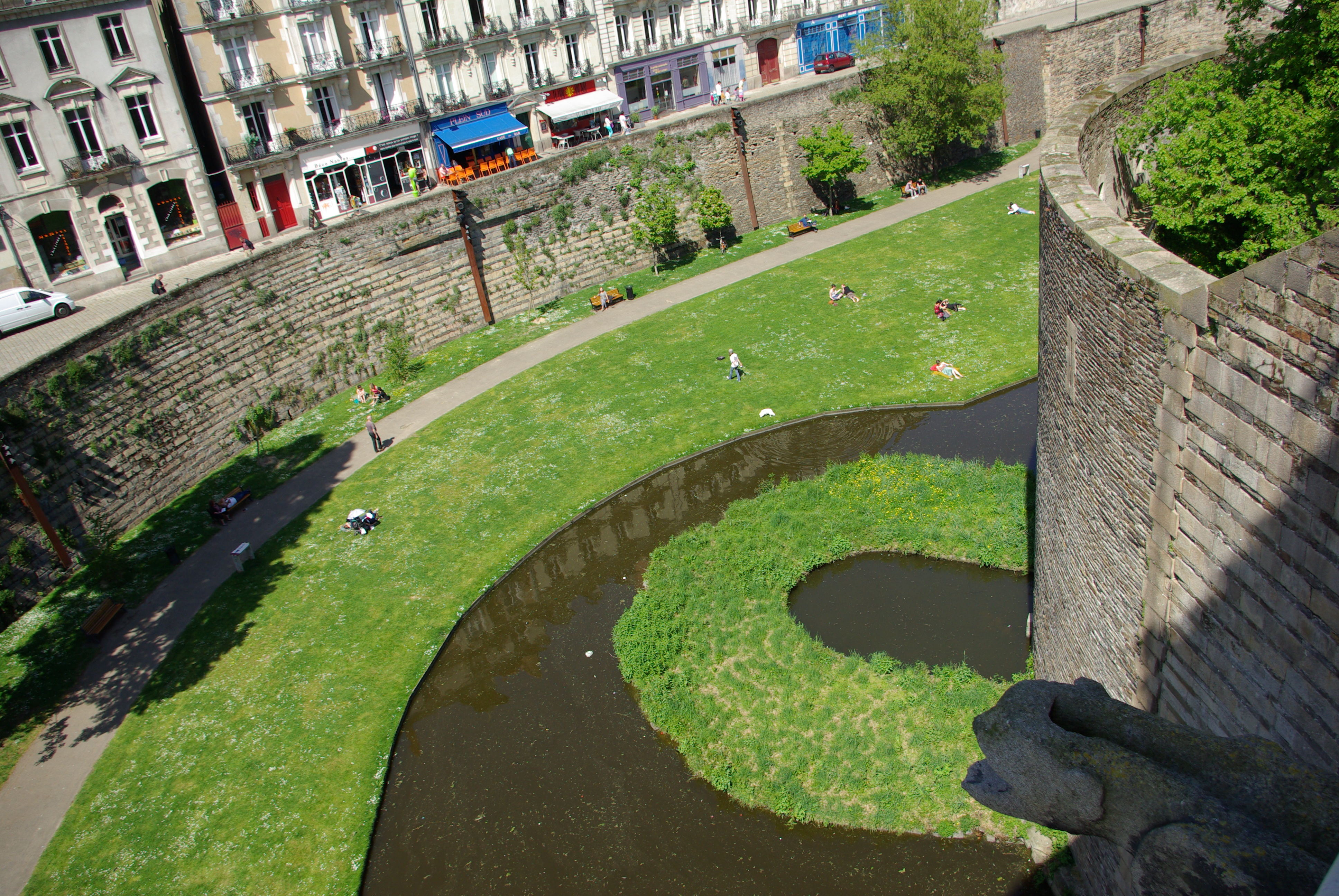 Douves du château des ducs de Bretagne.